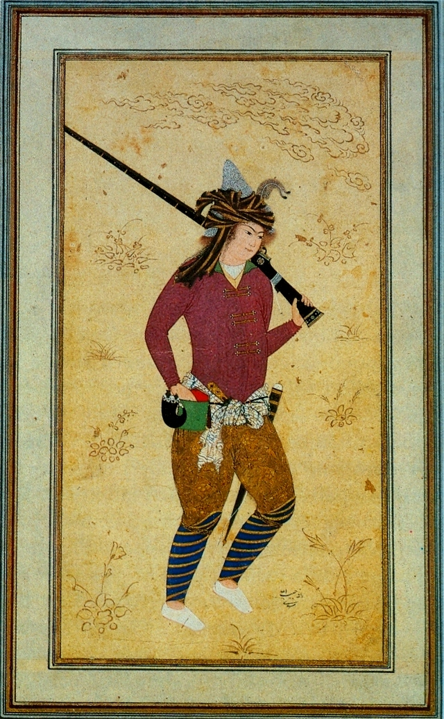 Habibulla_Meshedi_Хабибулла_Мешхеди_ок.1600_Юноша_с_ружьем Licensing Template:Перенести на Викисклад